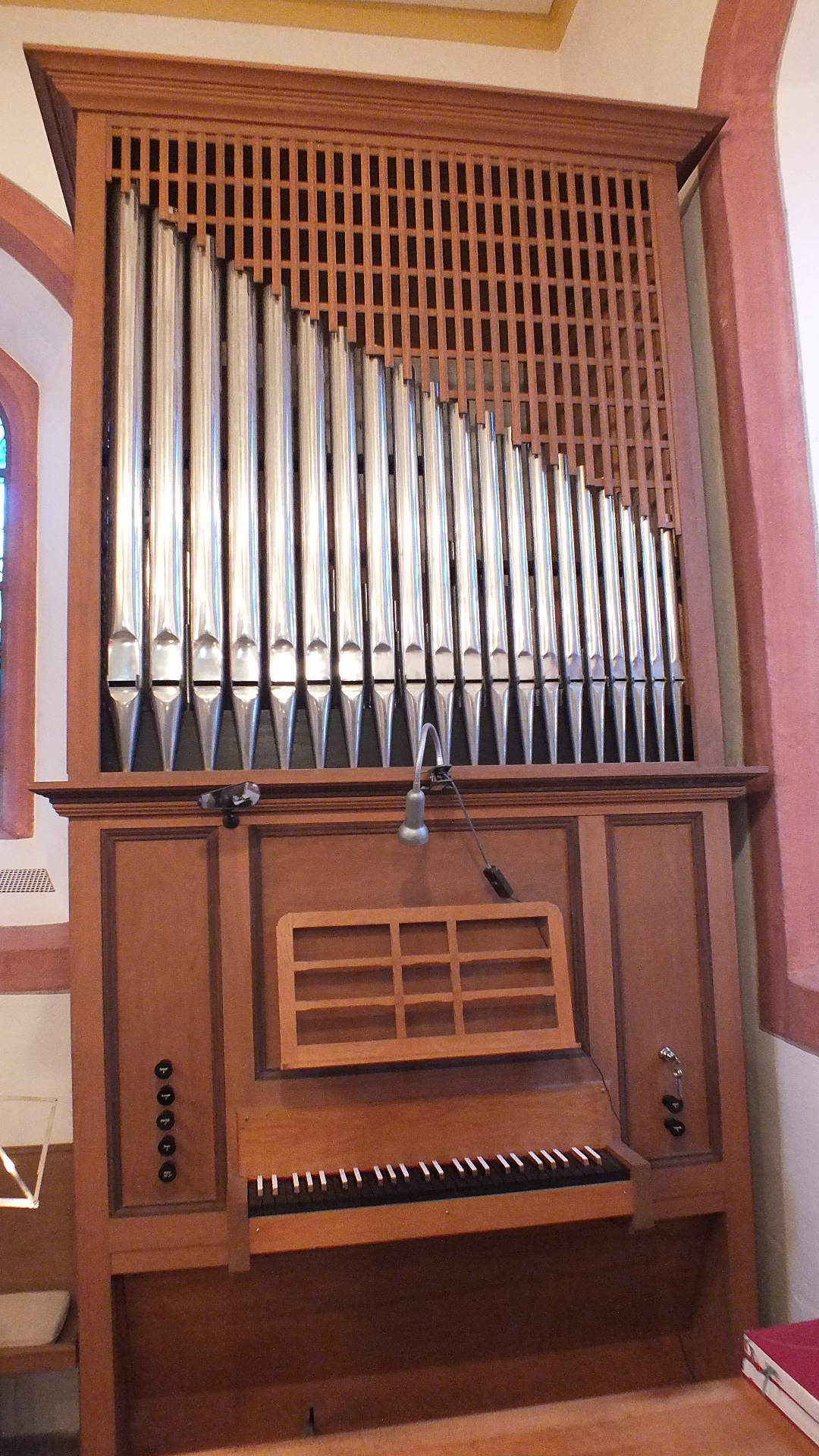 Evangelische Kirche Launsbach, Gemeinde Wettenberg, Landkreis Gießen, Hessen, Deutschland